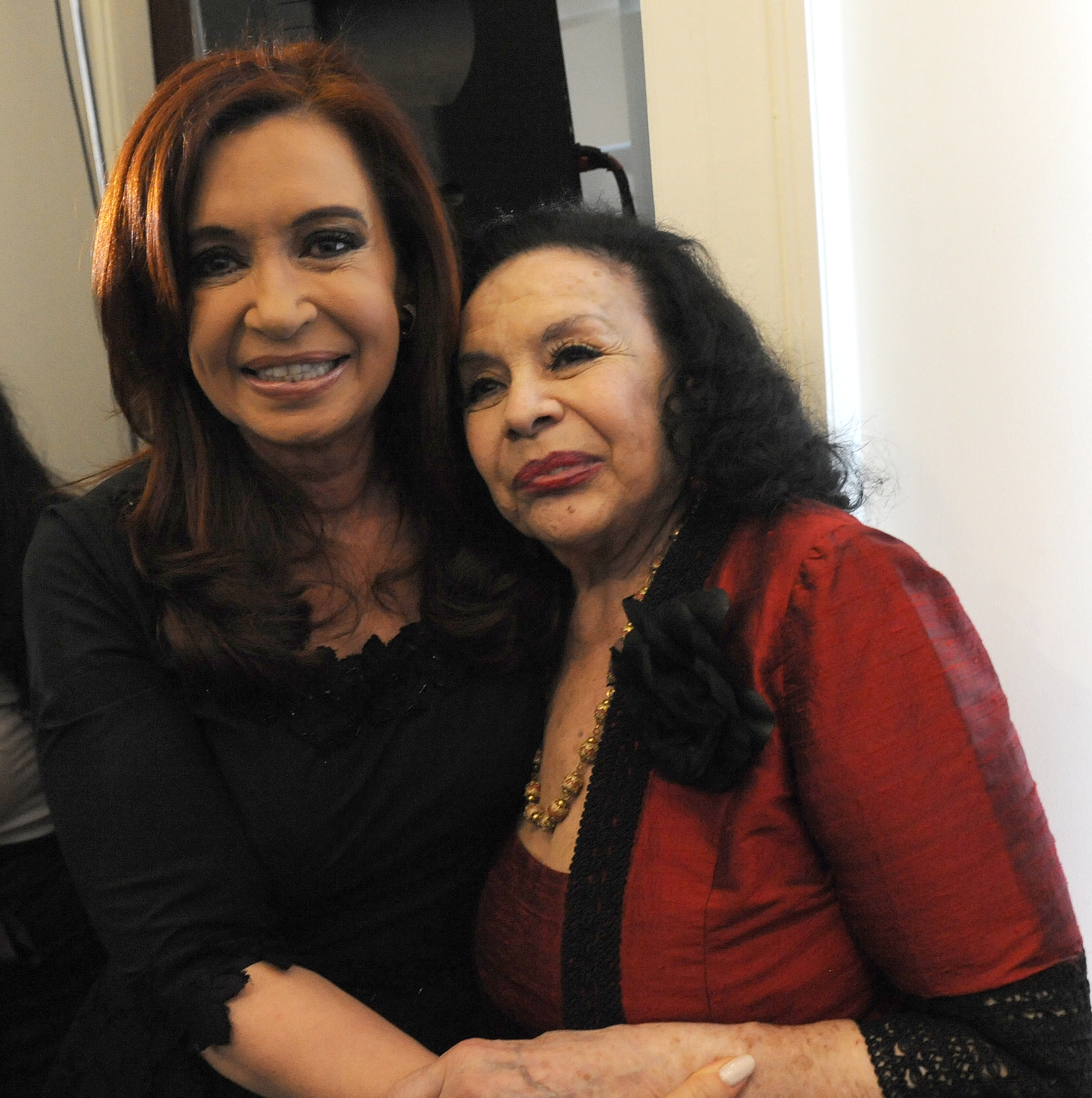 La presidenta Cristina Fernández abraza a la actriz Isabel Sarli en la inauguración de la Galería de los Ídolos Populares, en Casa de Gobierno.